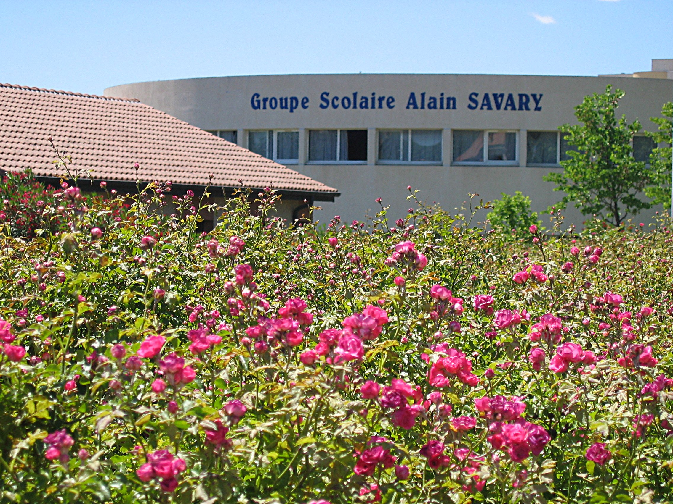 École Alain Savary à Montpellier, au premier plan un massif de roses. La photo est destinée à illustrer l'article sur Alain Savary, dans l'attente d'un portrait sous une licence convenable.